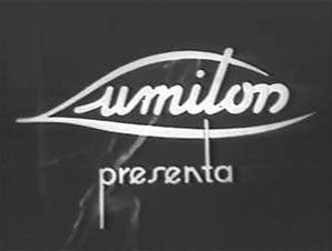 Logo de la desaparecida empresa Lumiton, productora de cine de la Argentina. Desaparecida en 1952.